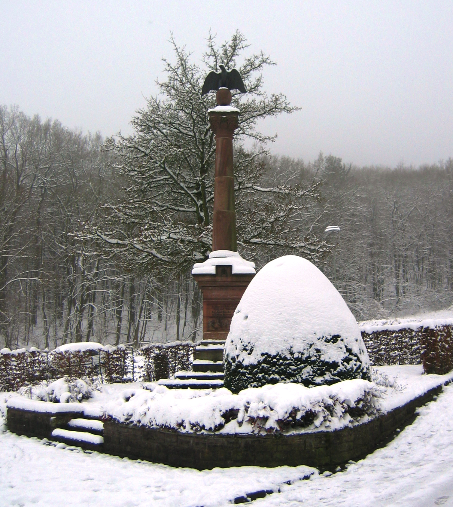 Das Ehrenmal am Schützenplatz (Ecke Schützenstraße/Kapellenstraße) in Bad Driburg, Nordrhein-Westfalen, Deutschland. Es wurde 1880 vom „Kriegerverein zu Driburg“ errichtet und ehrt die in den drei Kriegen 1864, 1866 und 1870/71 gefallenen Driburger Soldaten. Ursprünglich befand sich das Kriegerehrenmal an der Ecke Lange Straße/Bahnhofstraße. This is a photograph of an architectural monument. 55